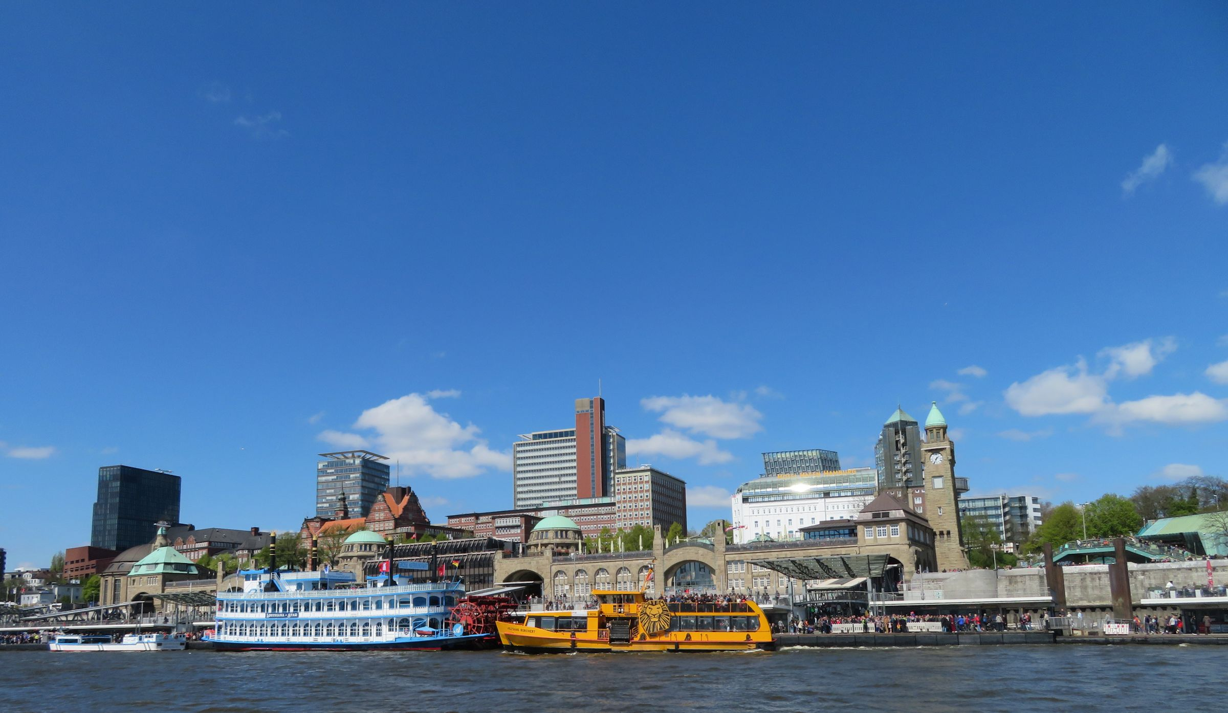 April 2017 in Hamburg